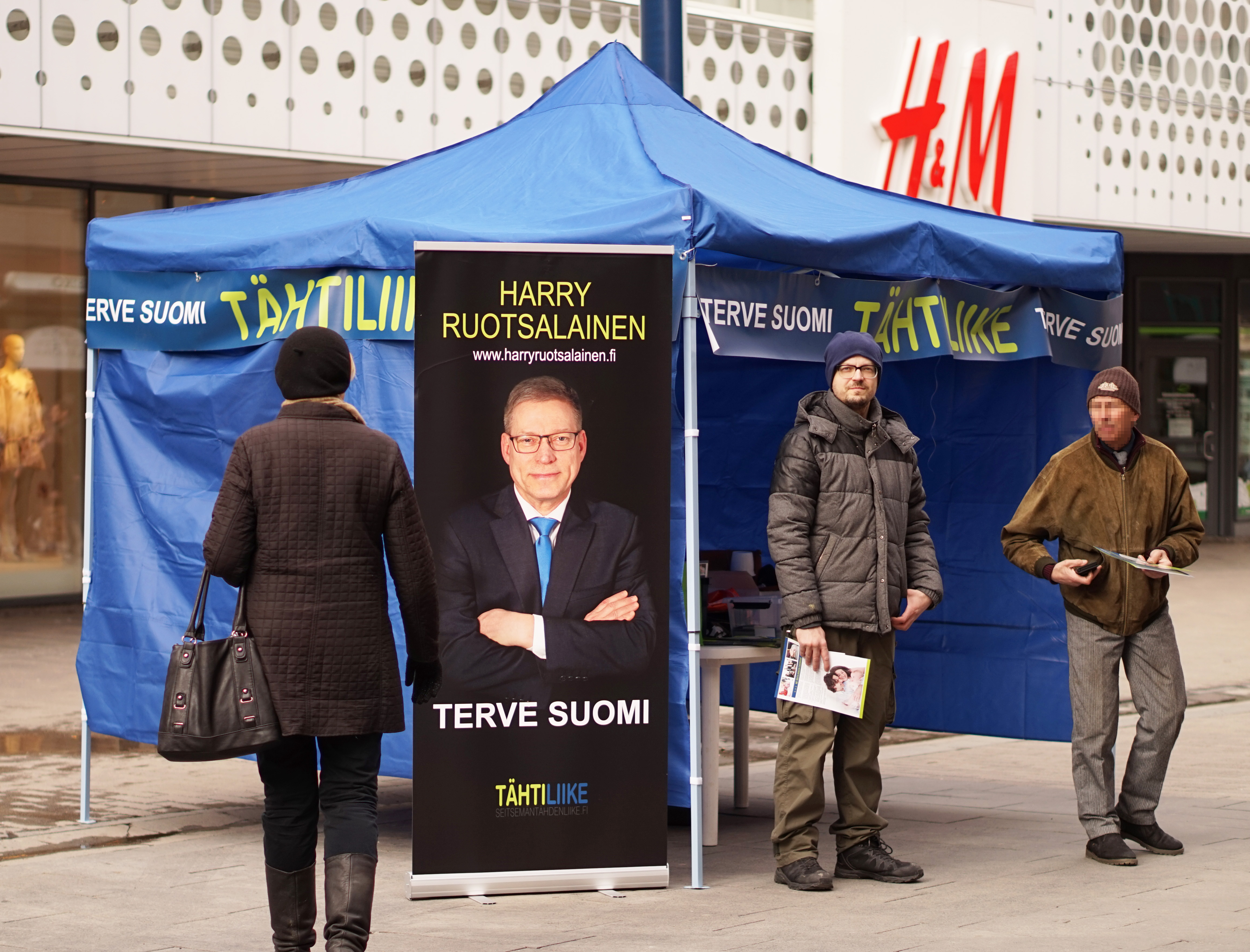 Seitsemän tähden liike Jyväskylässä eduskuntavaalien 2019 alla.